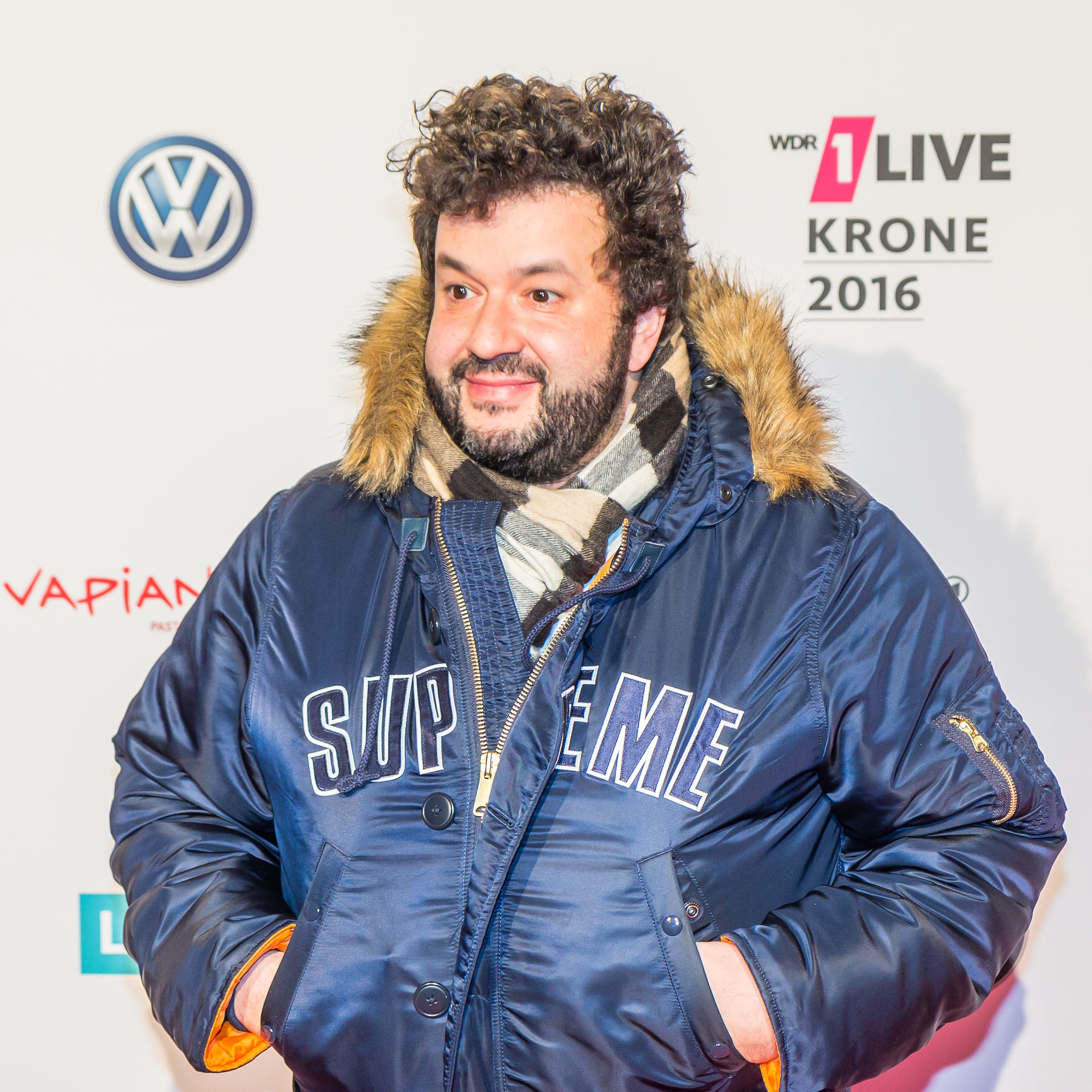 1LIVE Krone 2016 - 1700 - Roter Teppich - Oliver Polak